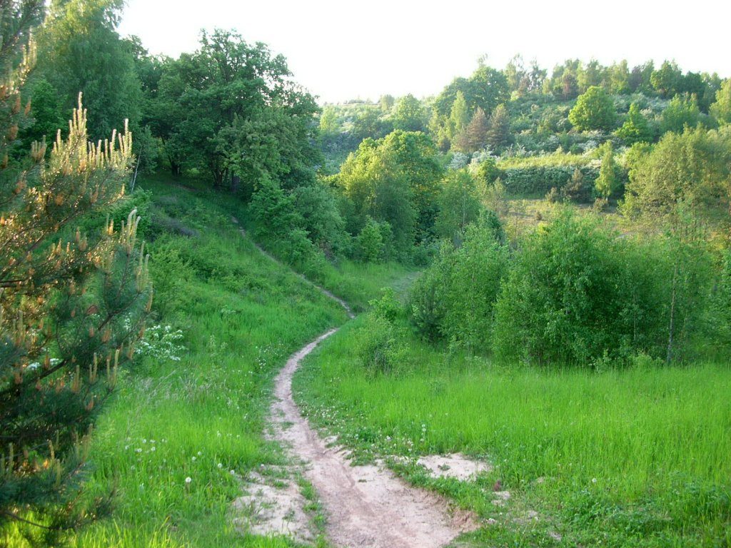 Na Zboczu Fordońskim